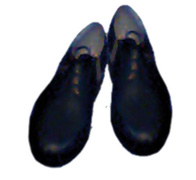 Półbuty do munduru wyjściowego ABW